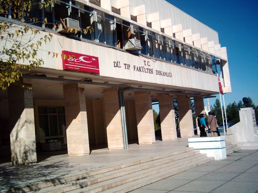 Dicle Üniversitesi Tıp Fakültesi.